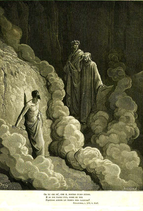 Dante Alighieri, La Divina Commedia, Purgatorio, XVI, vv. 46-48